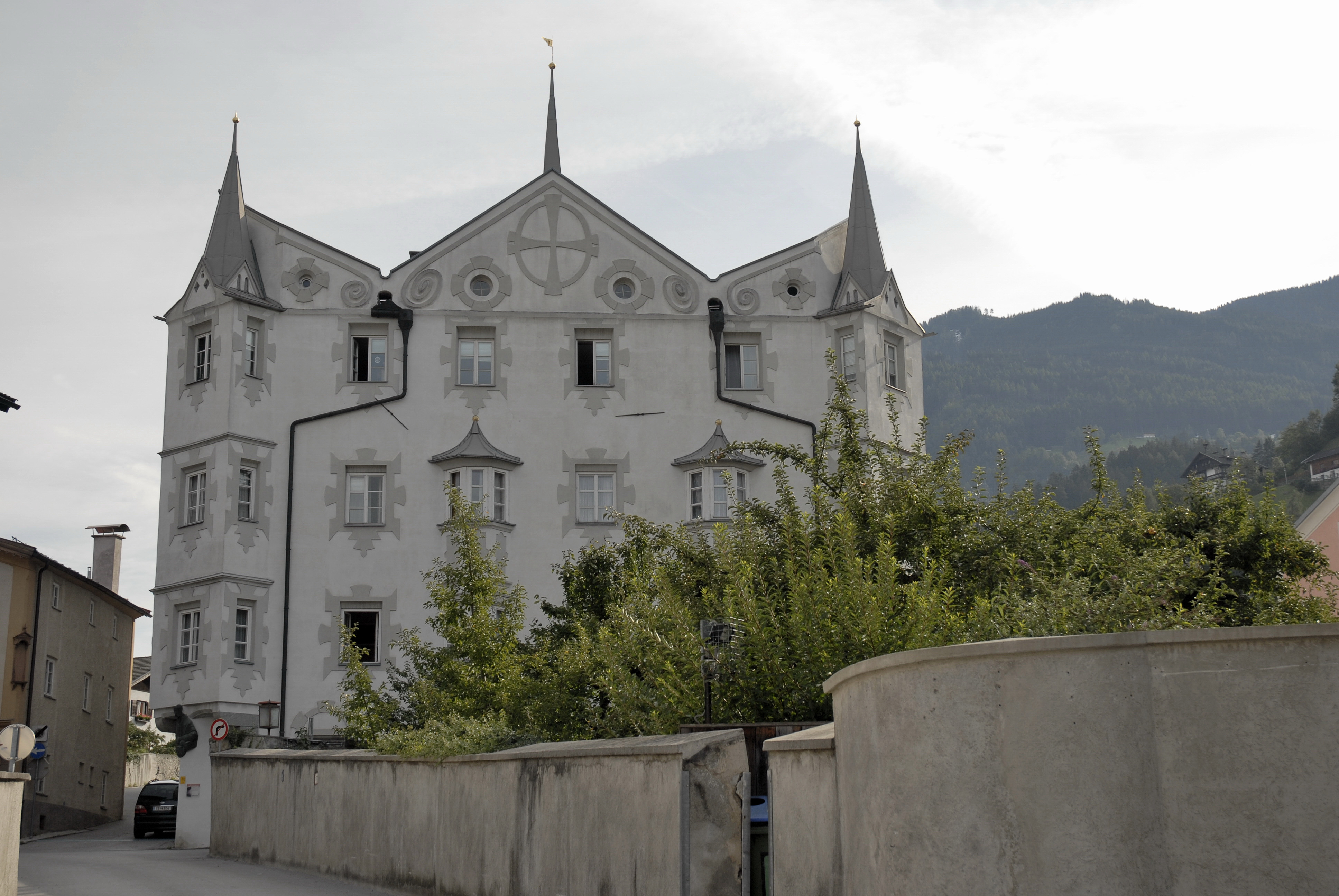 Schwaz, Fugger-Wohnhaus